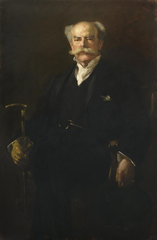 Henry Isaac Barbey